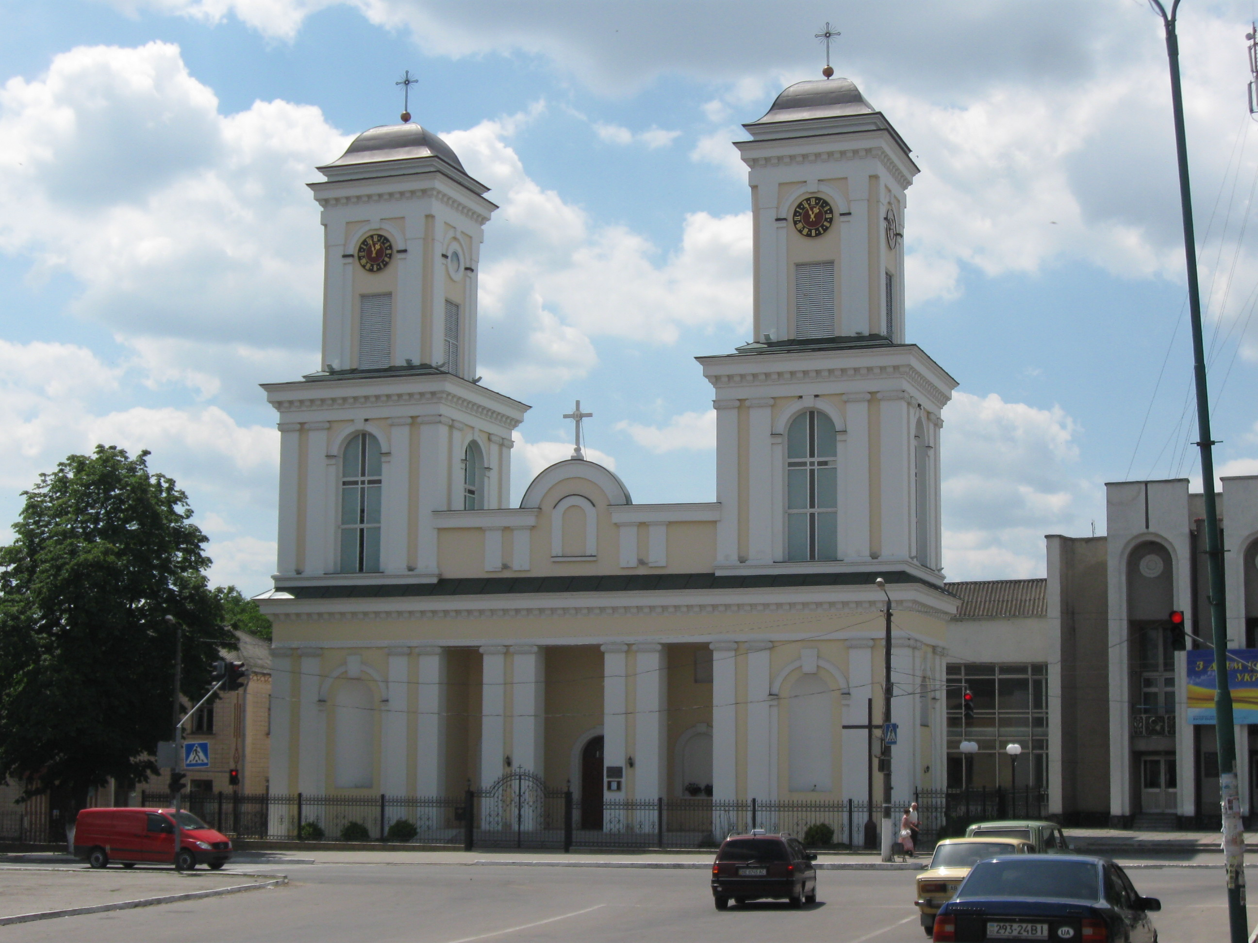 Римо-католицький костел святого Йосипа. Немирів. 2012